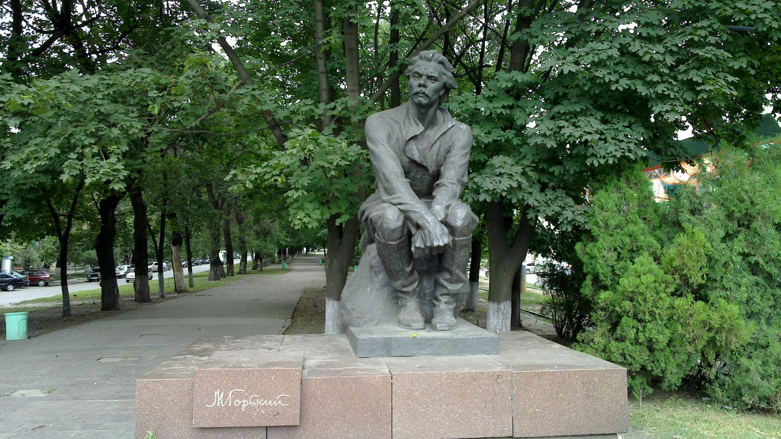 памятник М.Горькому